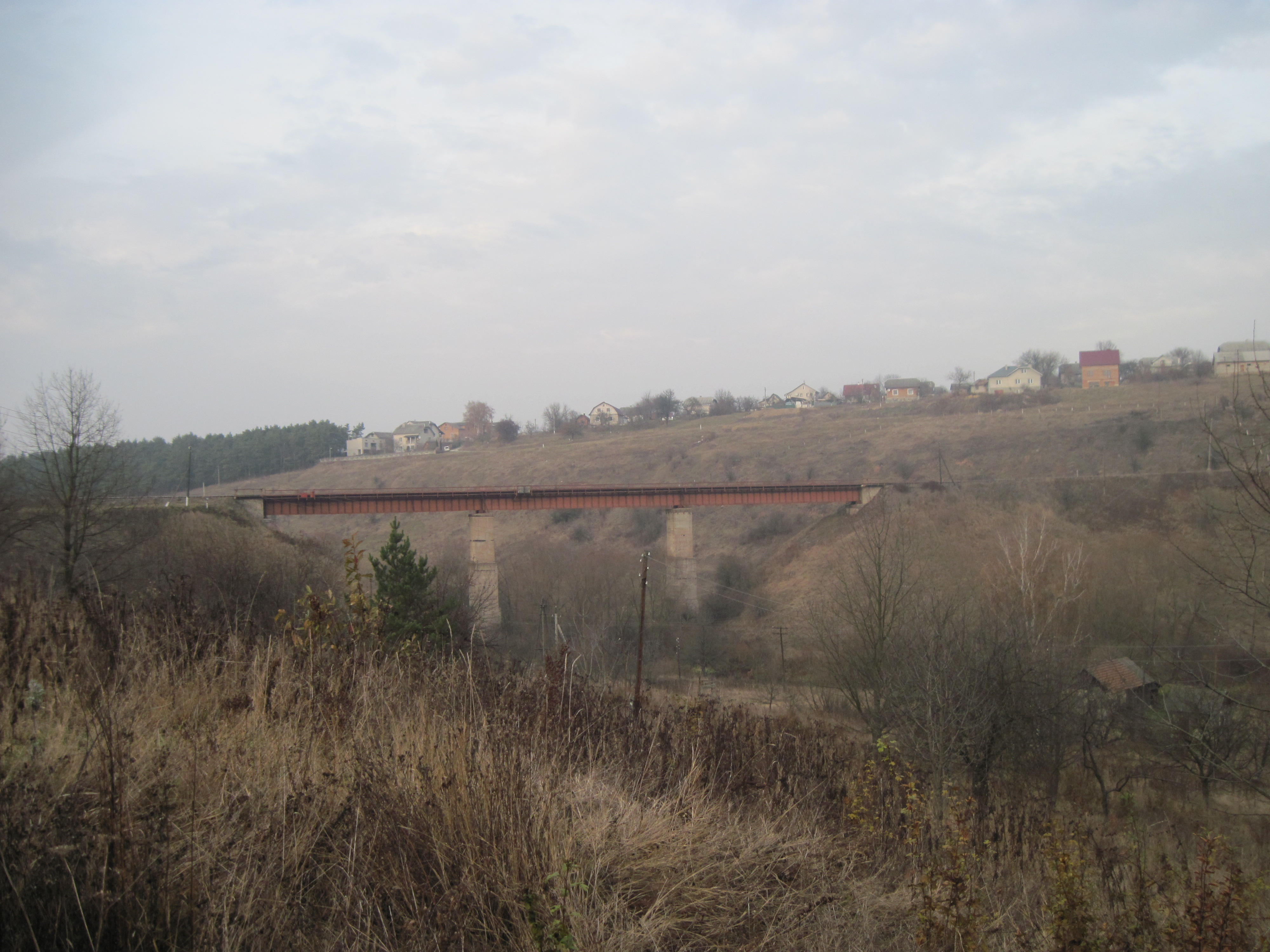 Залізничний міст через р. Стрипу на околиці Бучача, 2014